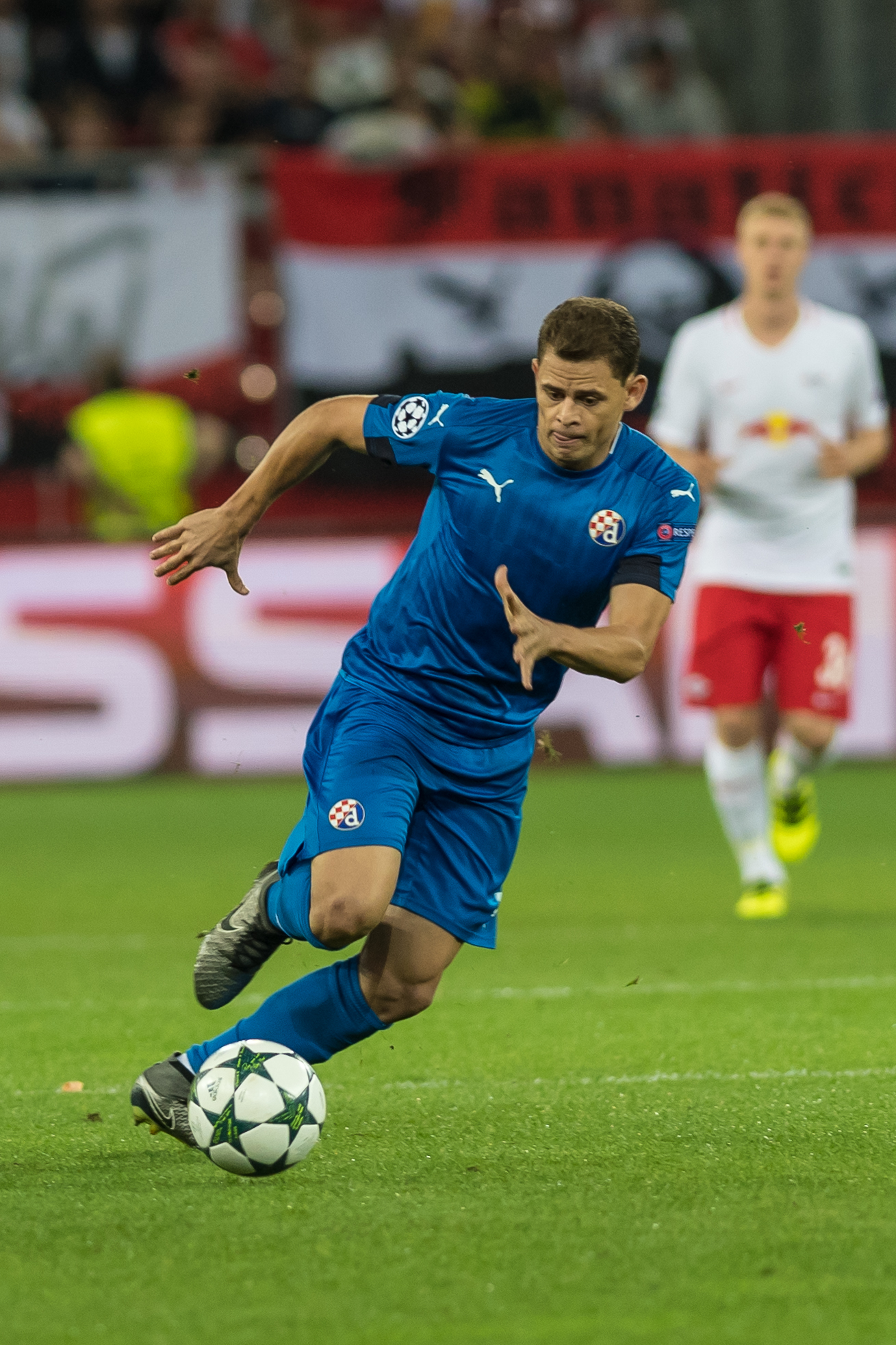 UEFA Champions League - Play-Offs - FC Salzburg vs Dinamo Zagreb. Bild zeigt Jonas (Dinamo Zagreb).